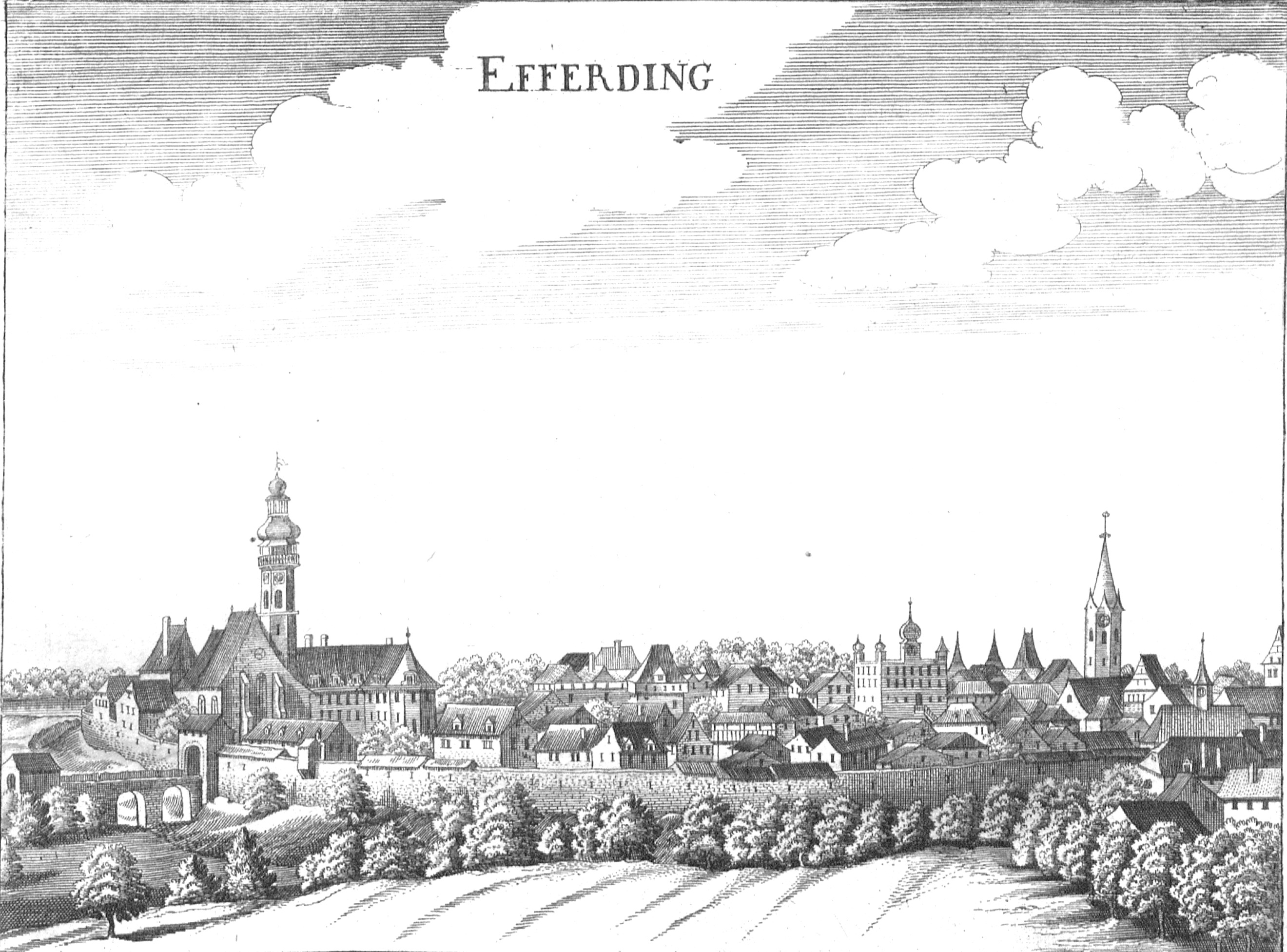 Schloss Starhemberg nach einem Stich von Georg Matthäus Vischer von 1674